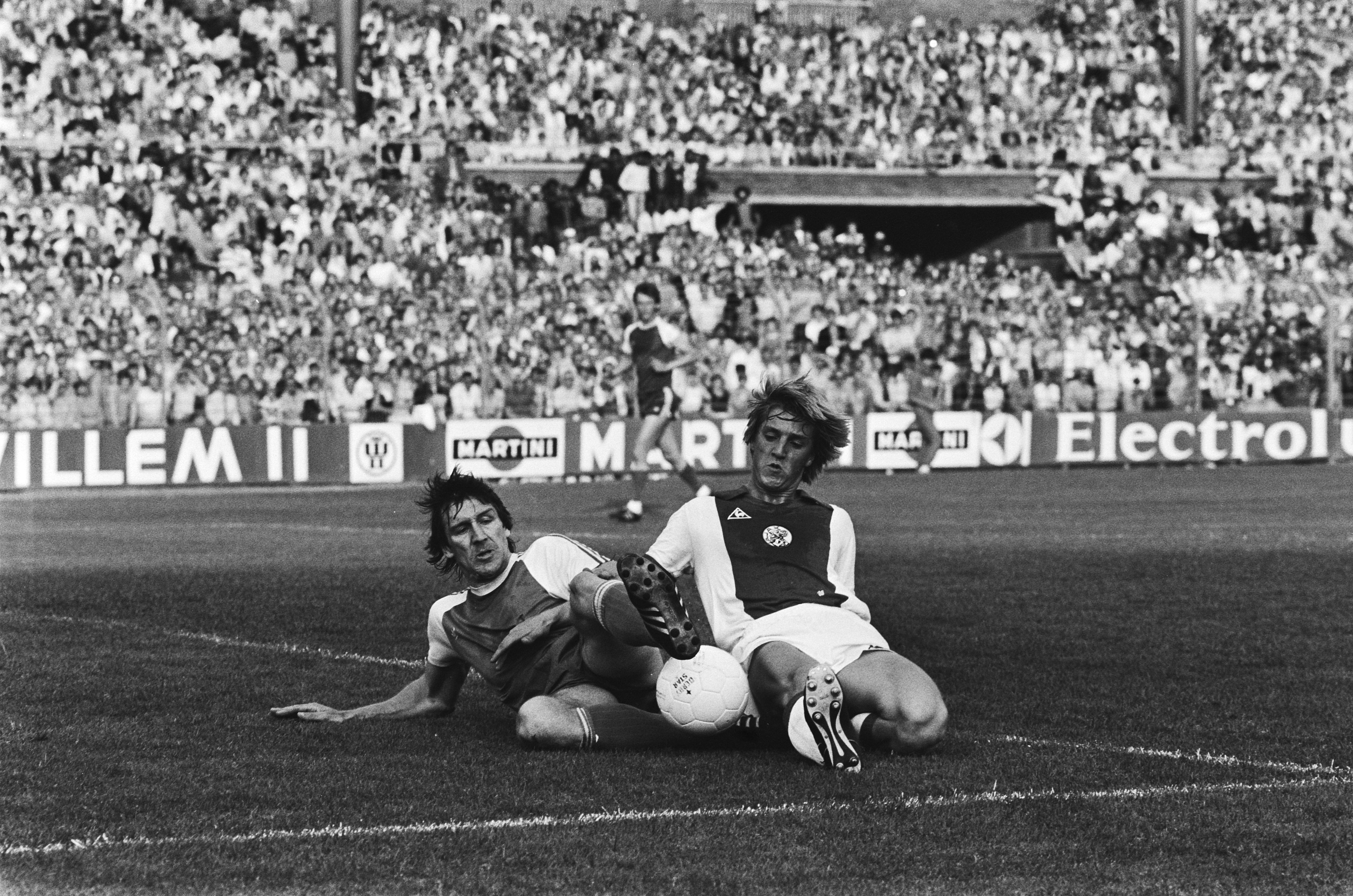 Collectie / Archief : Fotocollectie Anefo Reportage / Serie : [ onbekend ] Beschrijving : Ajax tegen AZ '67 3-2, Ajax kampioen; Kieft in duel met Spelbos Annotatie : neg.nr. 10 Datum : 15 mei 1982 Locatie : Amsterdam Trefwoorden : sport, voetbal Persoonsnaam : Kieft, Willem, Spelbos, Ronald Instellingsnaam : AJAX Fotograaf : Antonisse, Marcel / Anefo Auteursrechthebbende : Nationaal Archief Materiaalsoort : Negatief (zwart/wit) Nummer archiefinventaris : bekijk toegang 2.24.01.05 Bestanddeelnummer : 932-1616